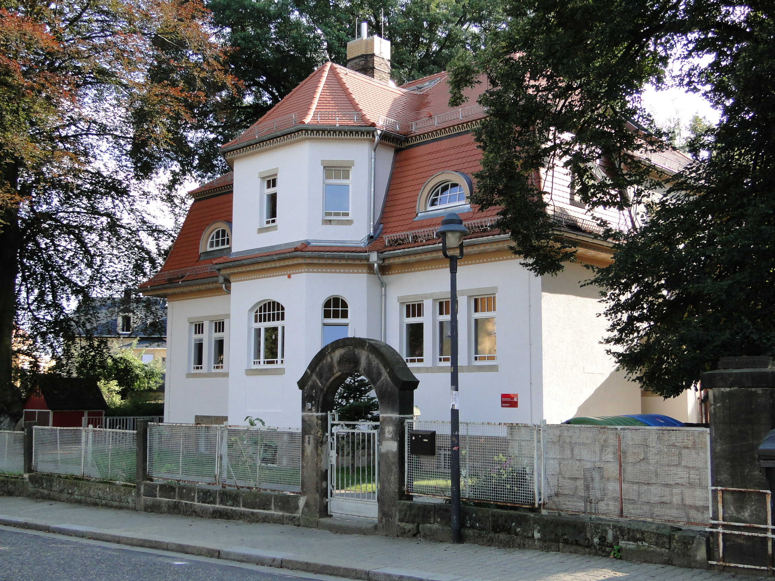 Kulturdenkmal Weißenberger Straße 1